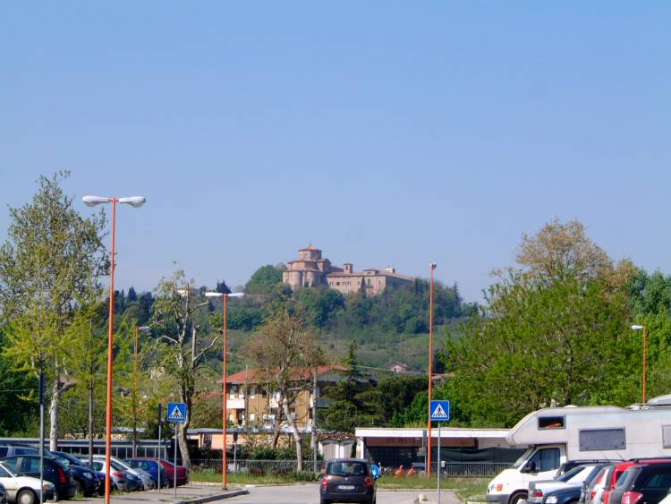 Je suis l'auteur de cette photo prise en avril 2007